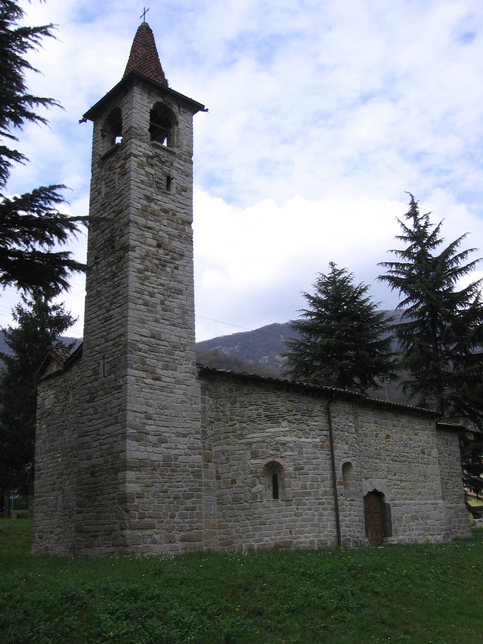 Spinone al lago, Bergamo, Italia